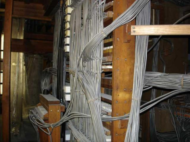 Pneumatischer Koppelapparat der Sauer-Orgel in der Moritzkirche Halle (Saale)